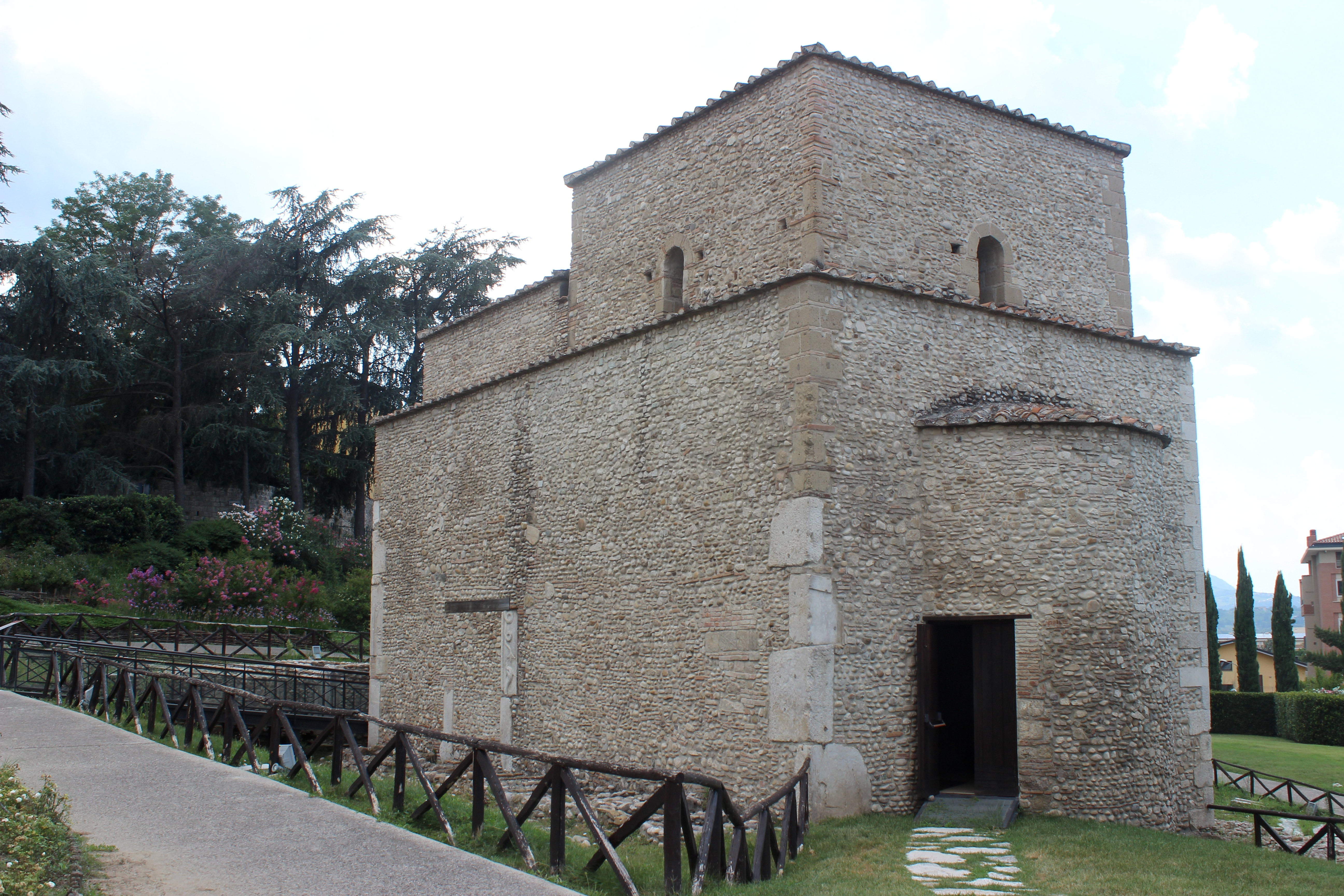 Benevento. Sant'Ilario a Port'Aurea.